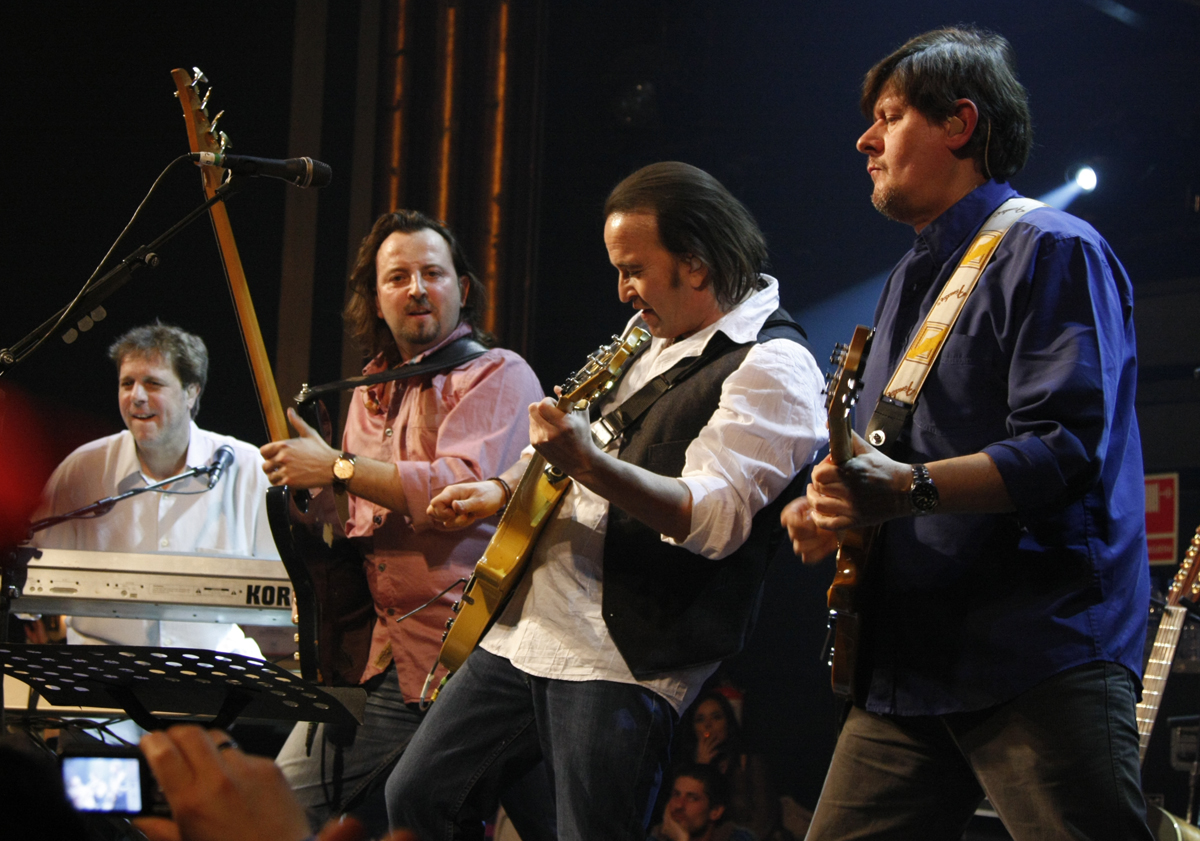 Concierto "Gracias por elegirme" en Granada10